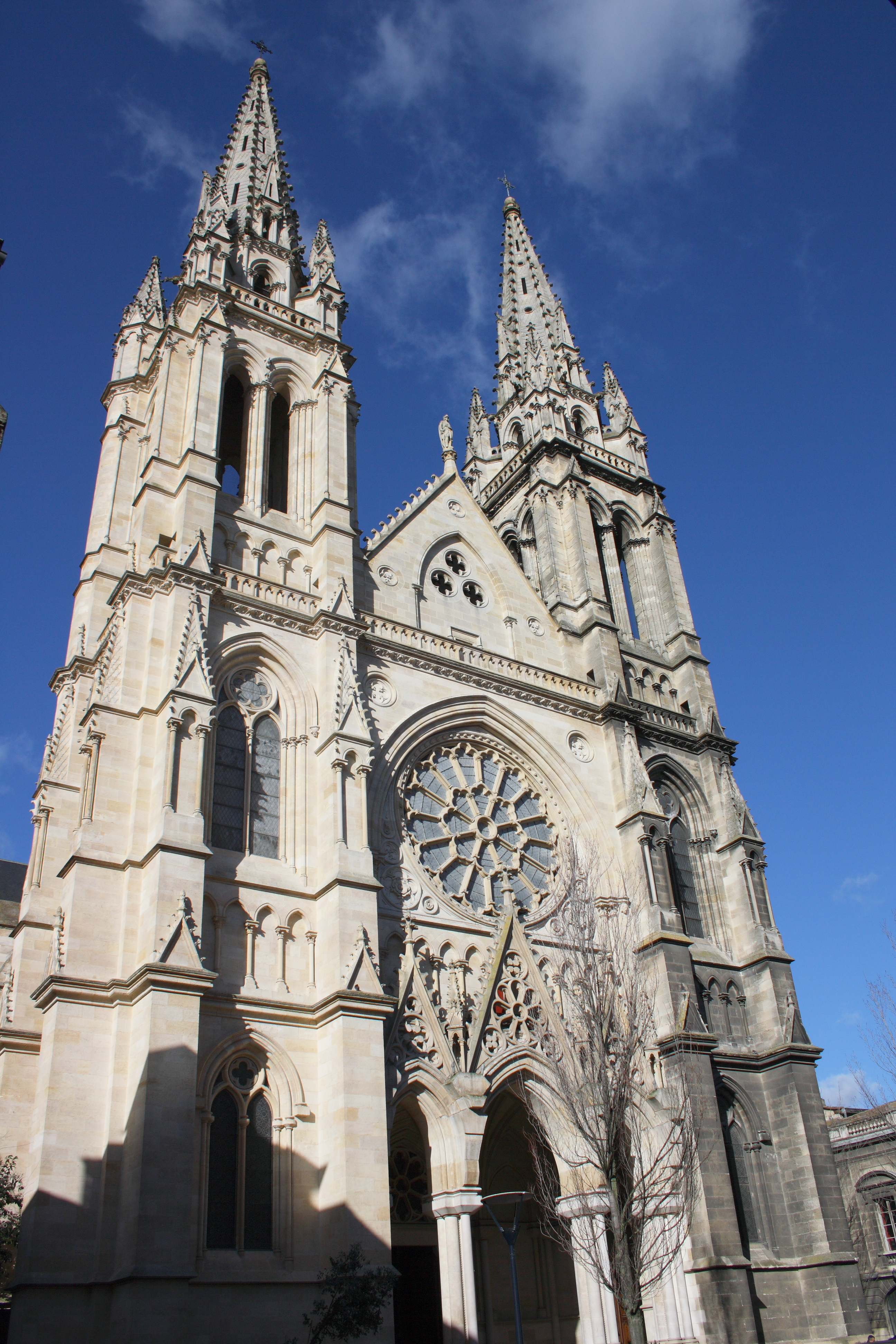 katholische Kirche Saint-Louis in Bordeaux